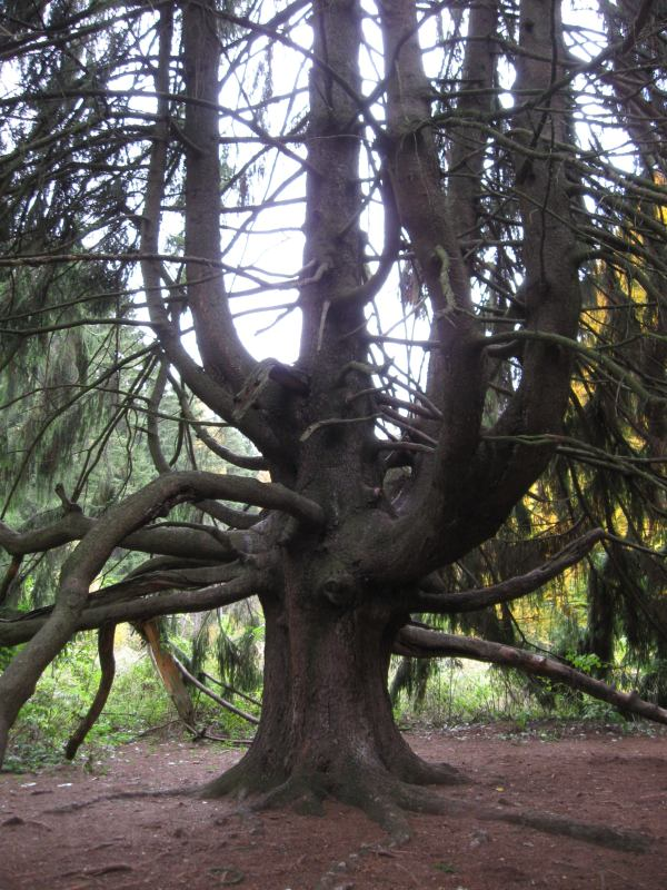 Tři smrky - největší strom